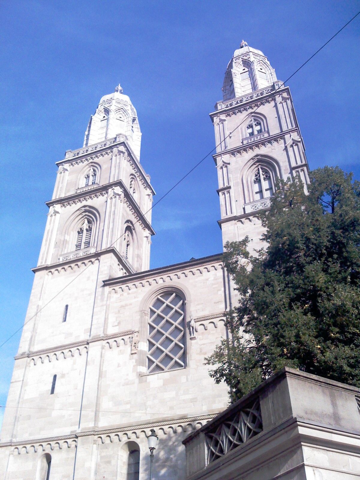 Kategorio:Bildoj de Kantono Zuriko Kategorio:Bildoj alŝutitaj de DidiWeidmann Kategorio:Bildoj faritaj de DidiWeidmann